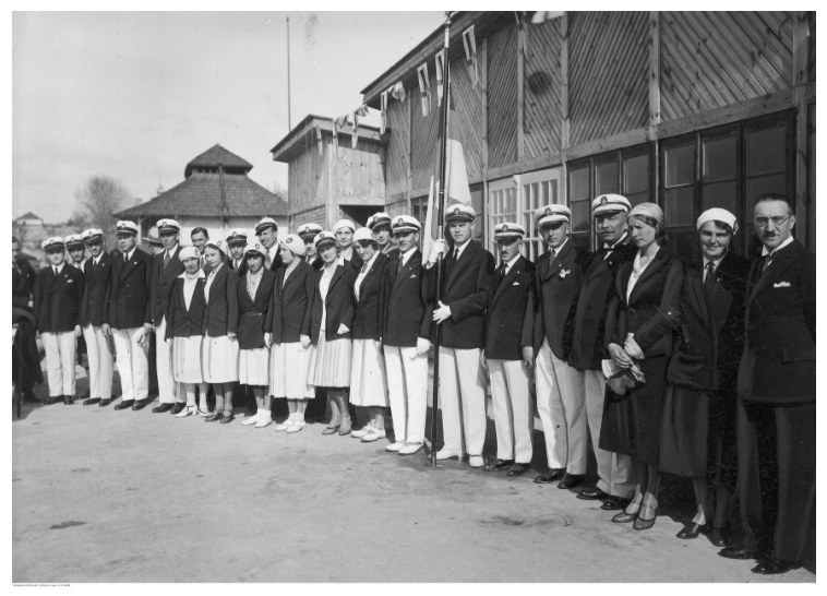 Wileńskie Towarzystwo Wioślarskie - Otwarcie sezonu 1937